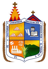 Escudo de un municipio mexicano, simbolizando lo más "característico" de él.